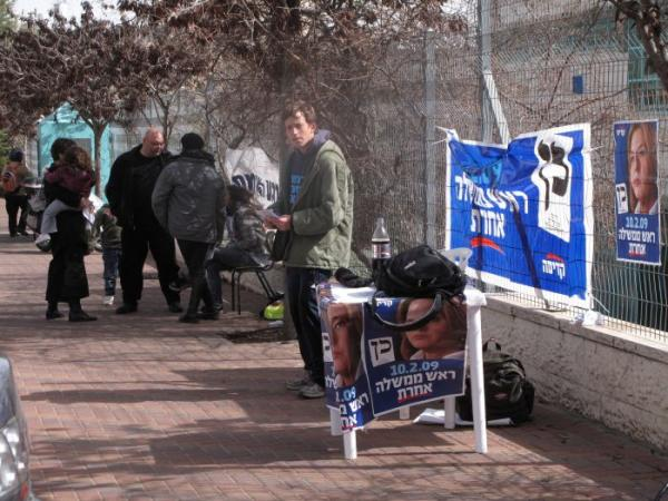 קלפי בירושלים